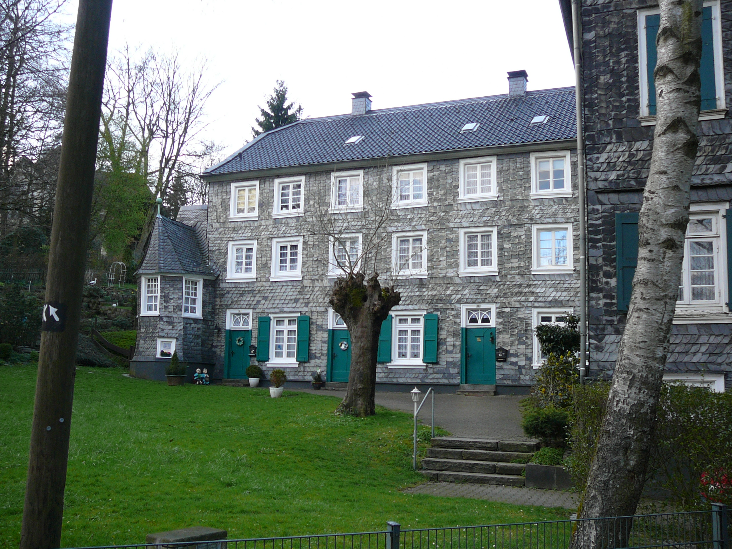 In der Mirke, Wuppertal